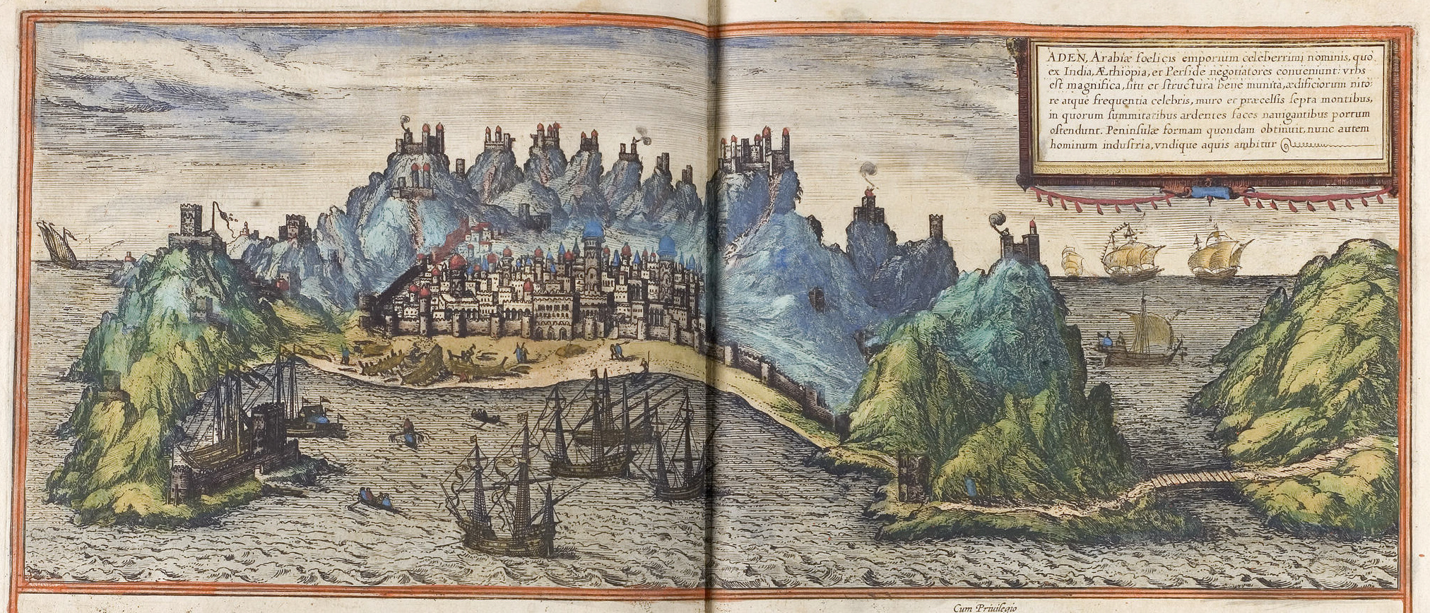 Aden